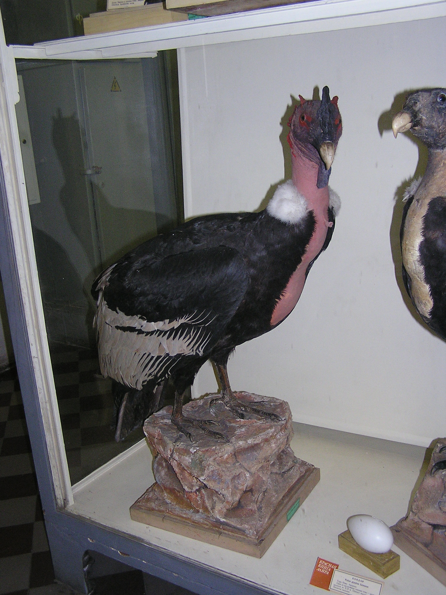 Зоологический музей в Санкт-Петербурге. Кондор